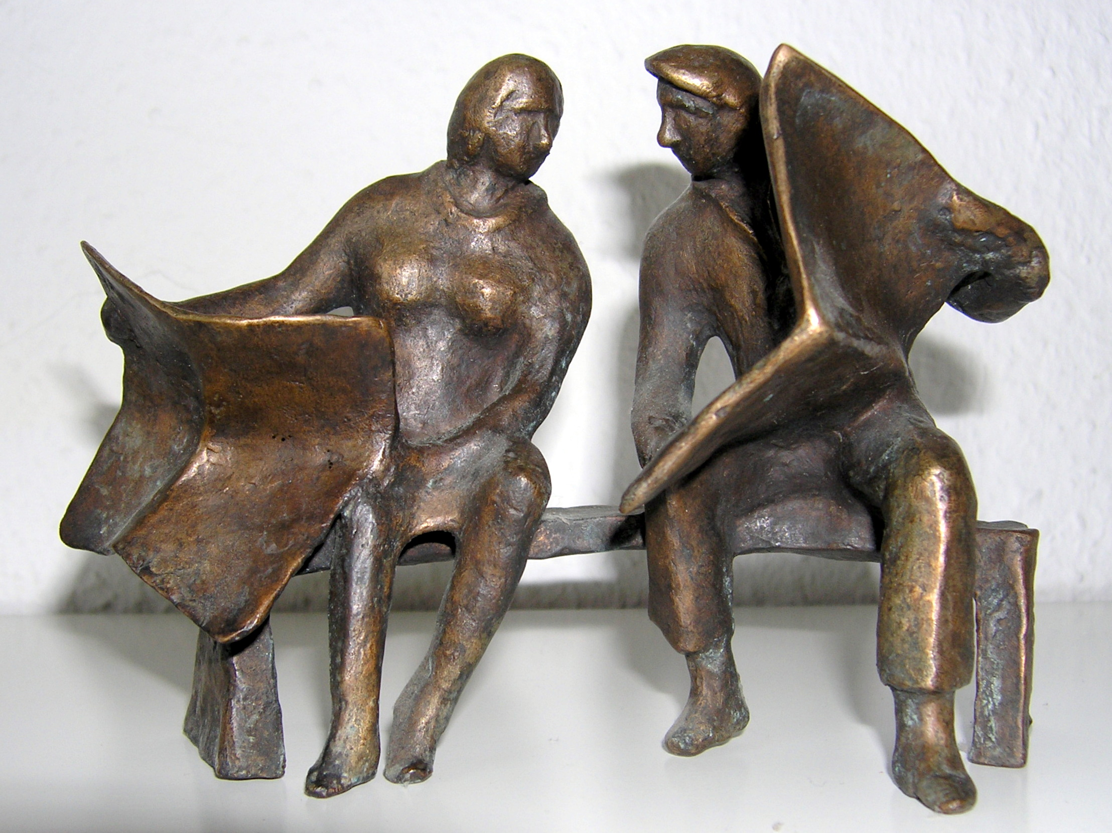 "Zeitungsleser", eine Bronze-Skulptur von Hans Mocznay (1906 - 1996)